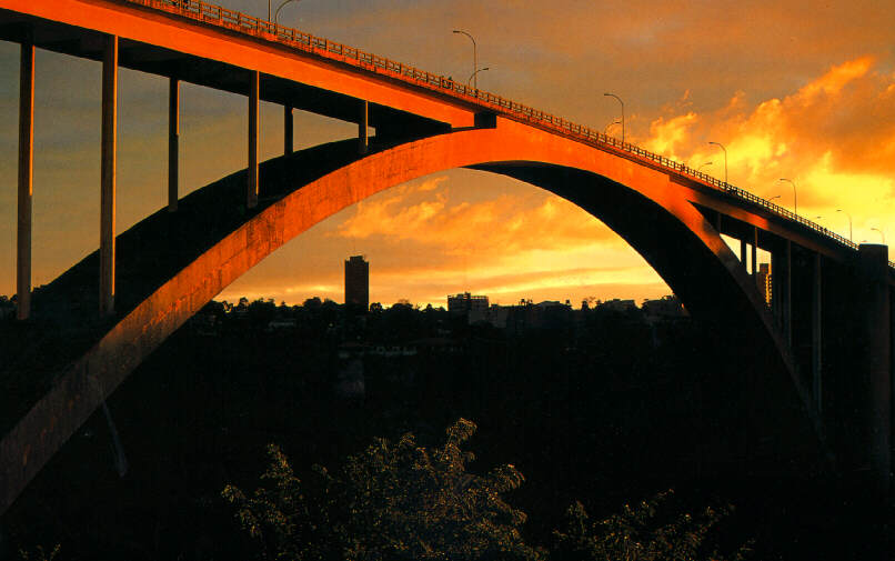 Foto da ponte da amizade, na fronteira do brasil com o paraguay.